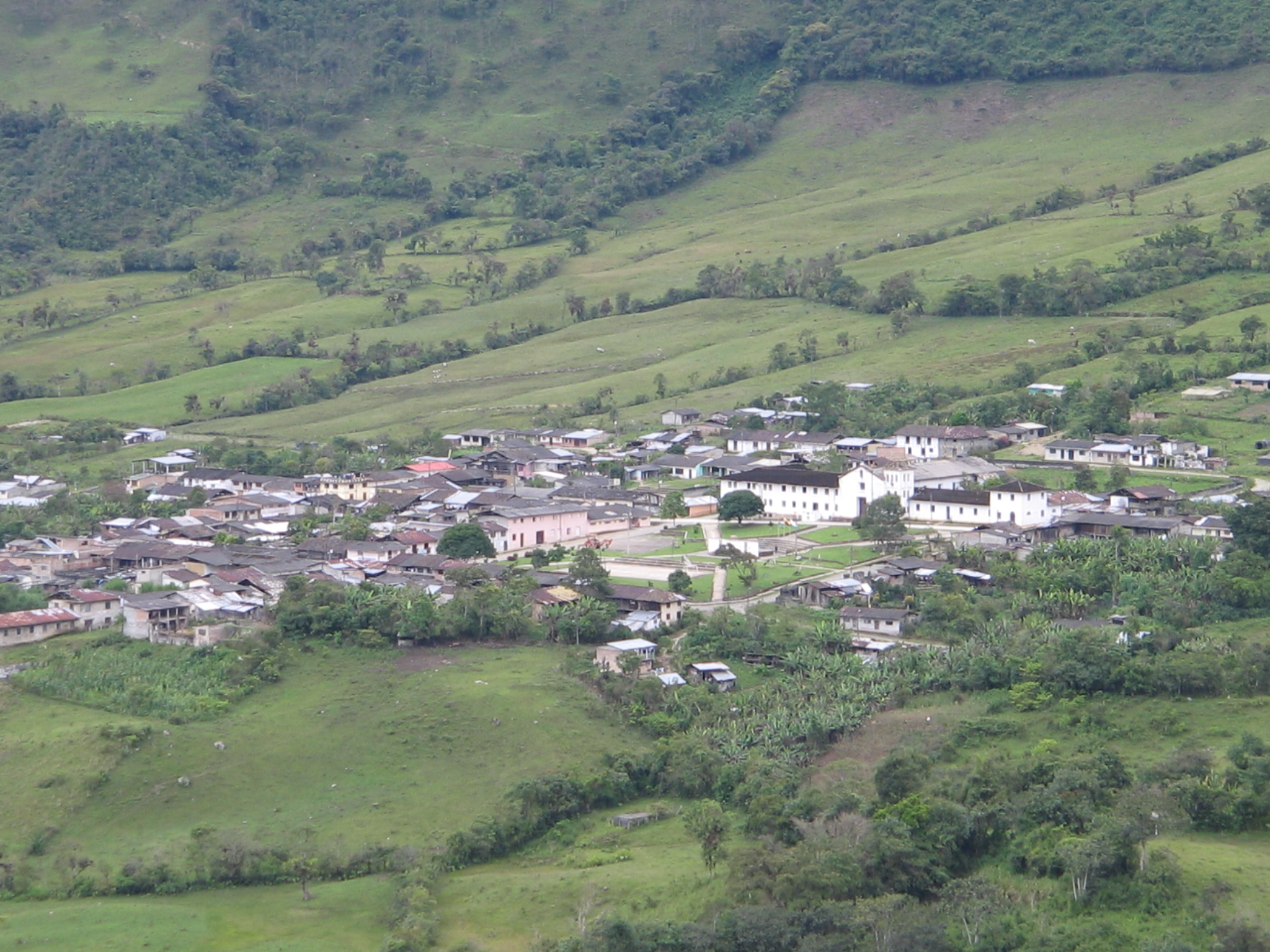 SAnta Rosa - Cauca